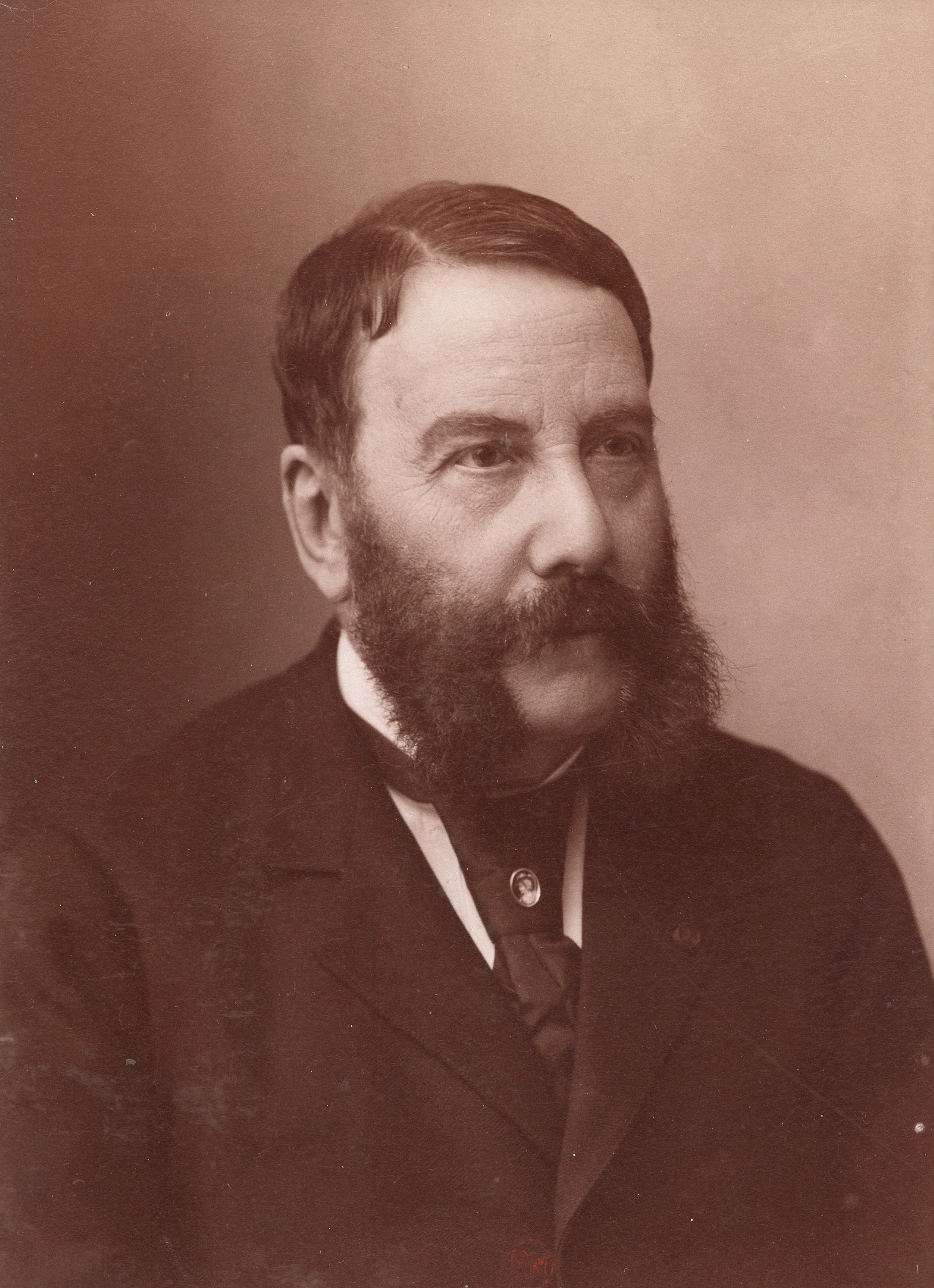 Photographie d'Émile Decombes vers 1893